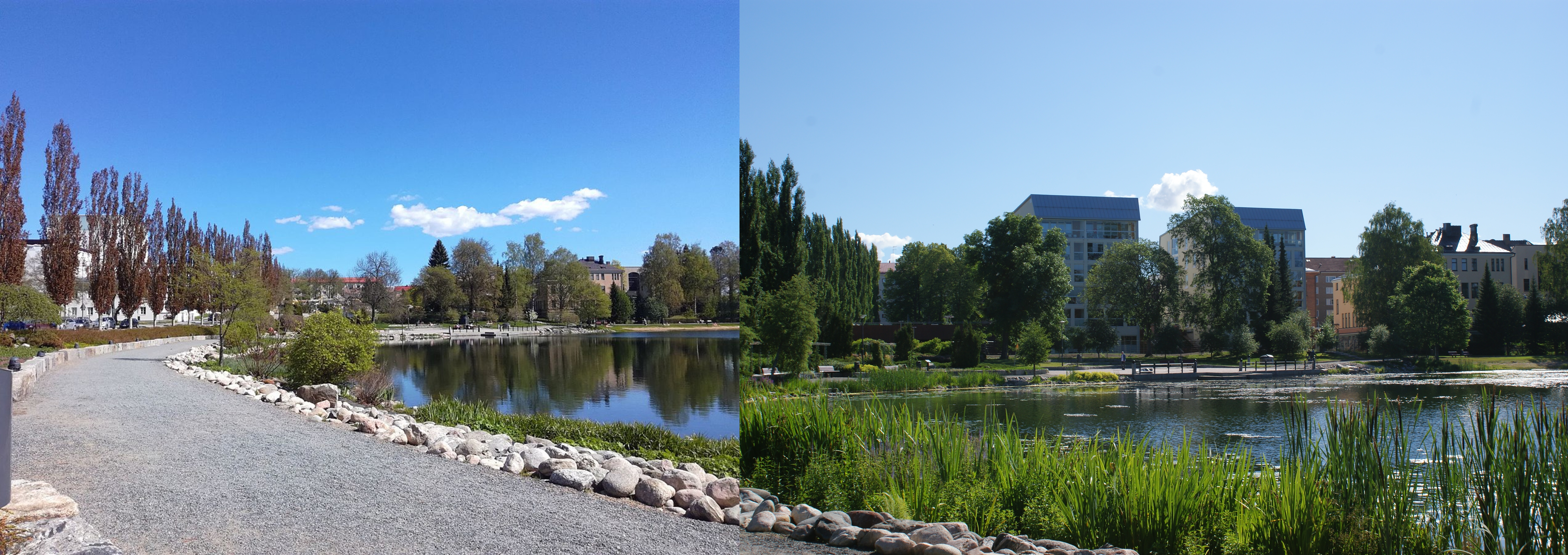 Valkeisenlampi keväällä 2017 ja kesällä 2019.